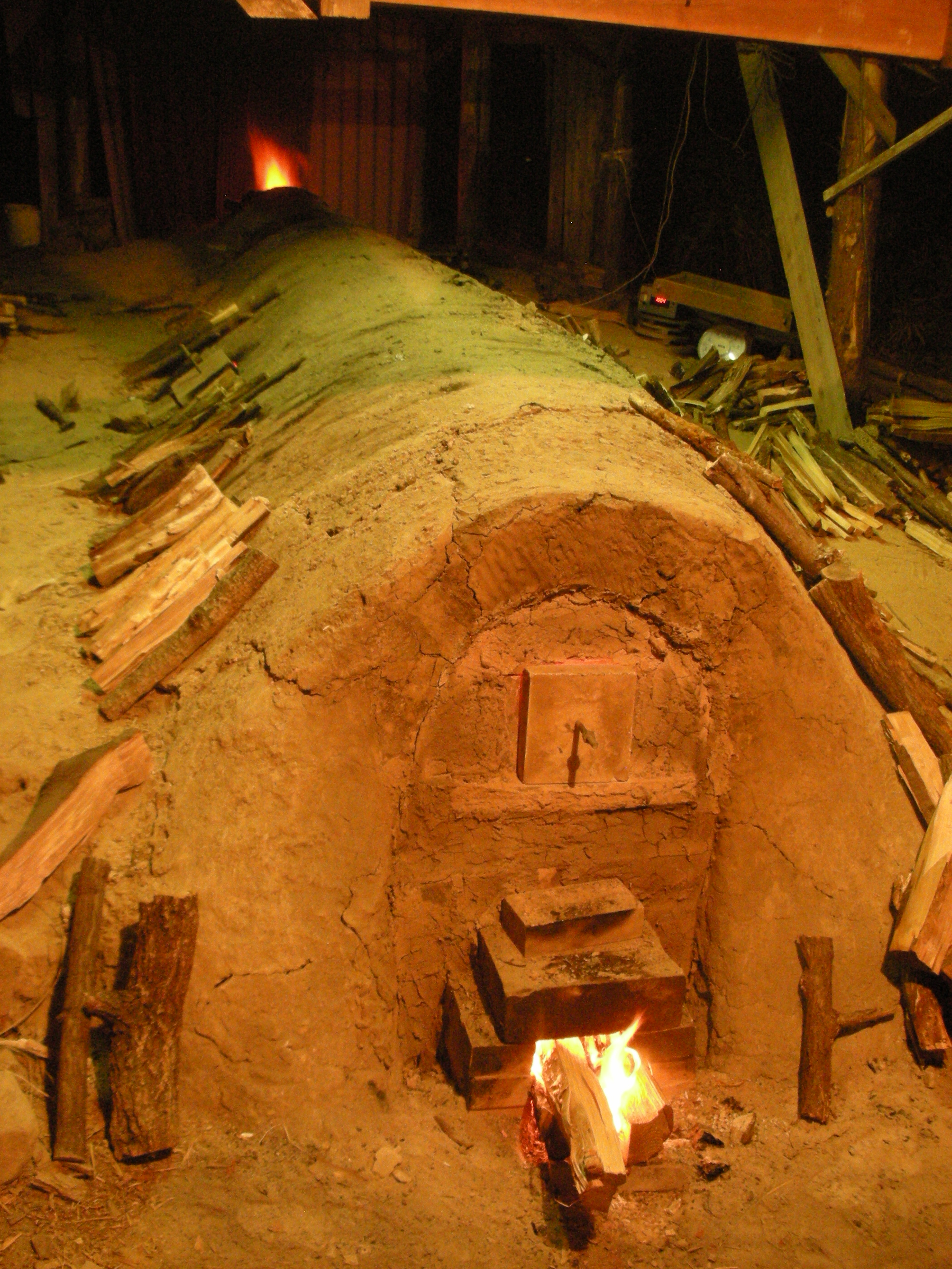 土窯（つちがま）焼成写真